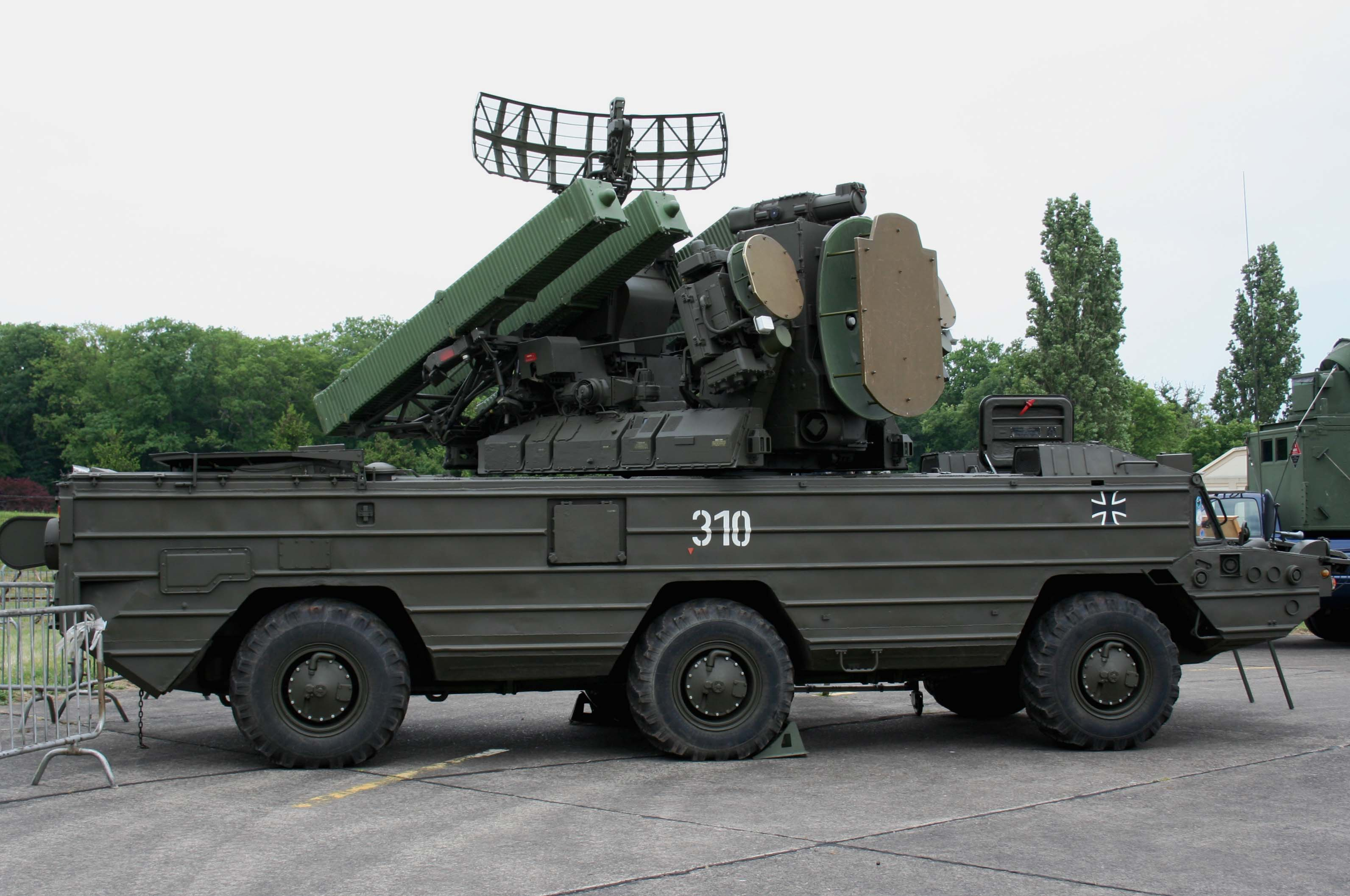 SA-8 du Polygone de Guerre Electronique sur la BA128 en 2007